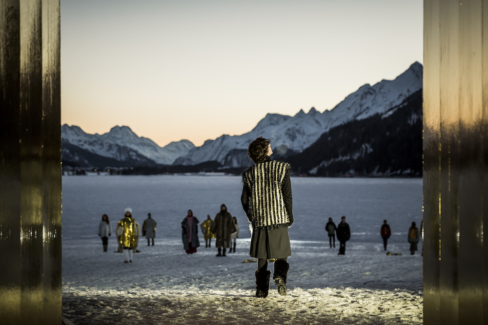 Ansicht des Freilichttheaters "König im Schnee" im Jahr 2014 am Silvaplana See